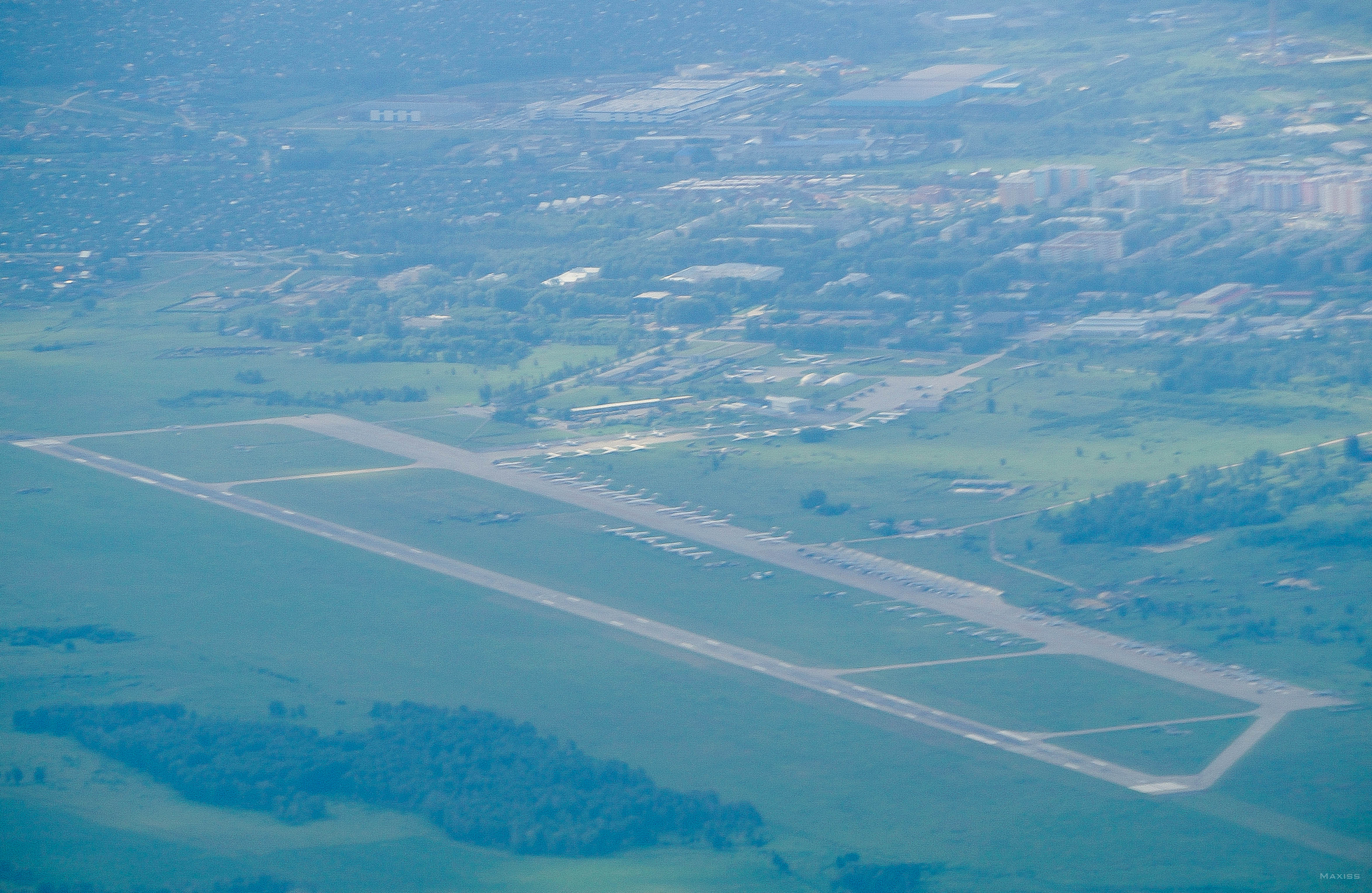 Аэродром Шагол